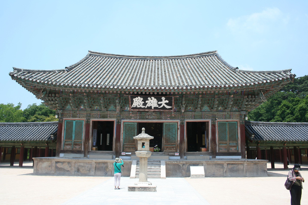 Bulguksa, Gyeongju, Gyeongsangnam-do, South Korea